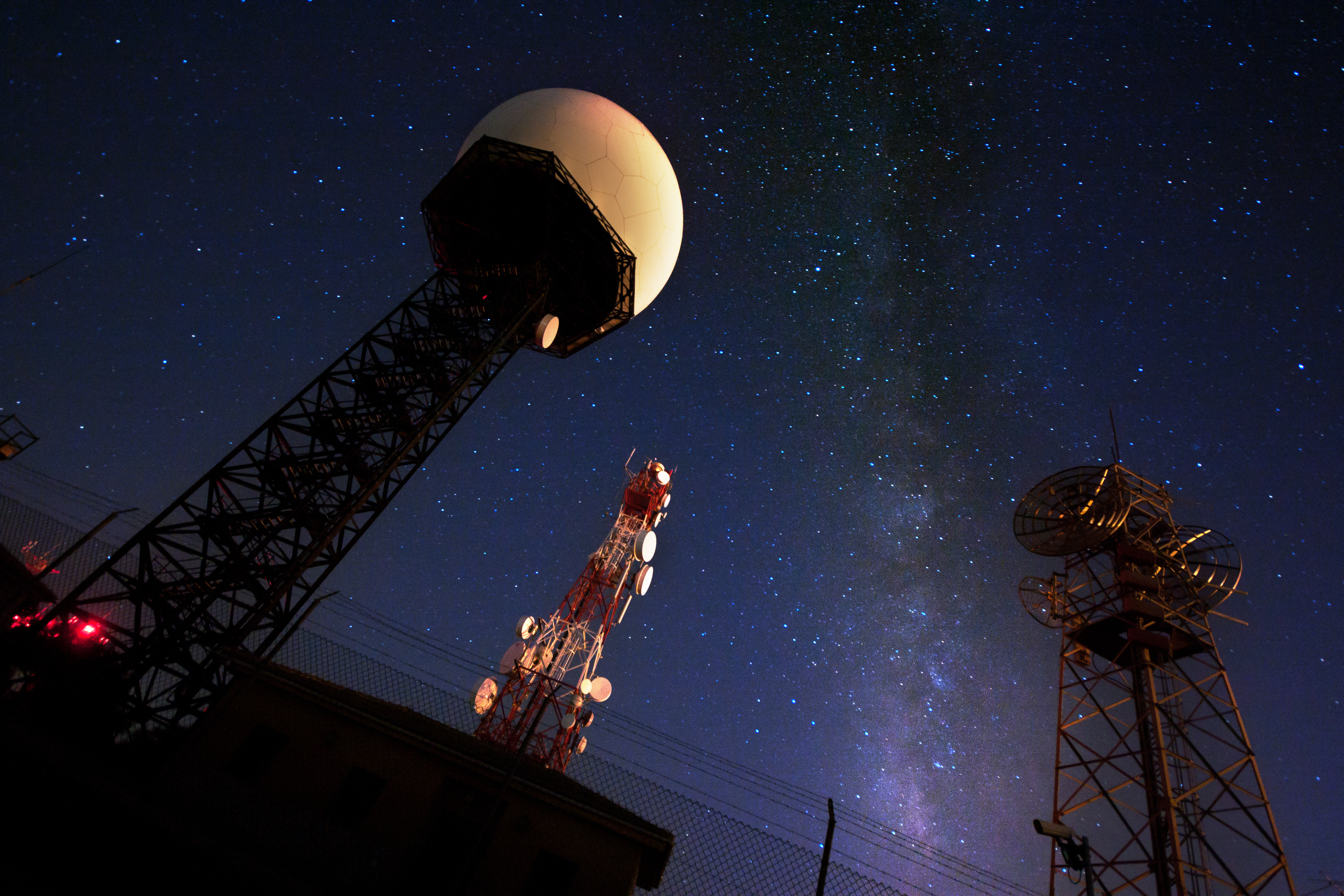 Vista de la Vía Láctea desde Randa (entre Lluchmayor y Algaida), en las Islas Baleares, España.